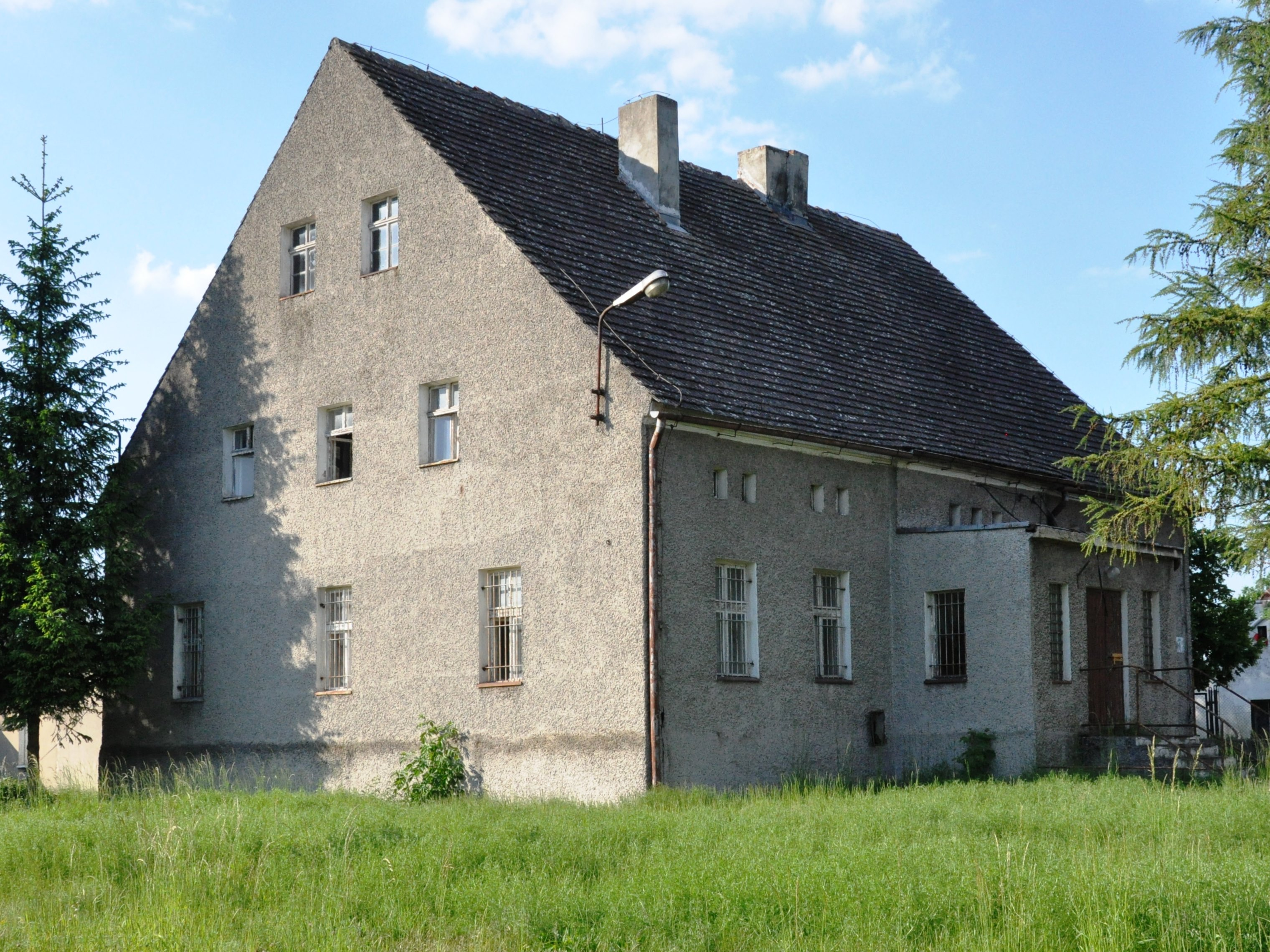 Strażnica WOP/SG w_Strzegowie